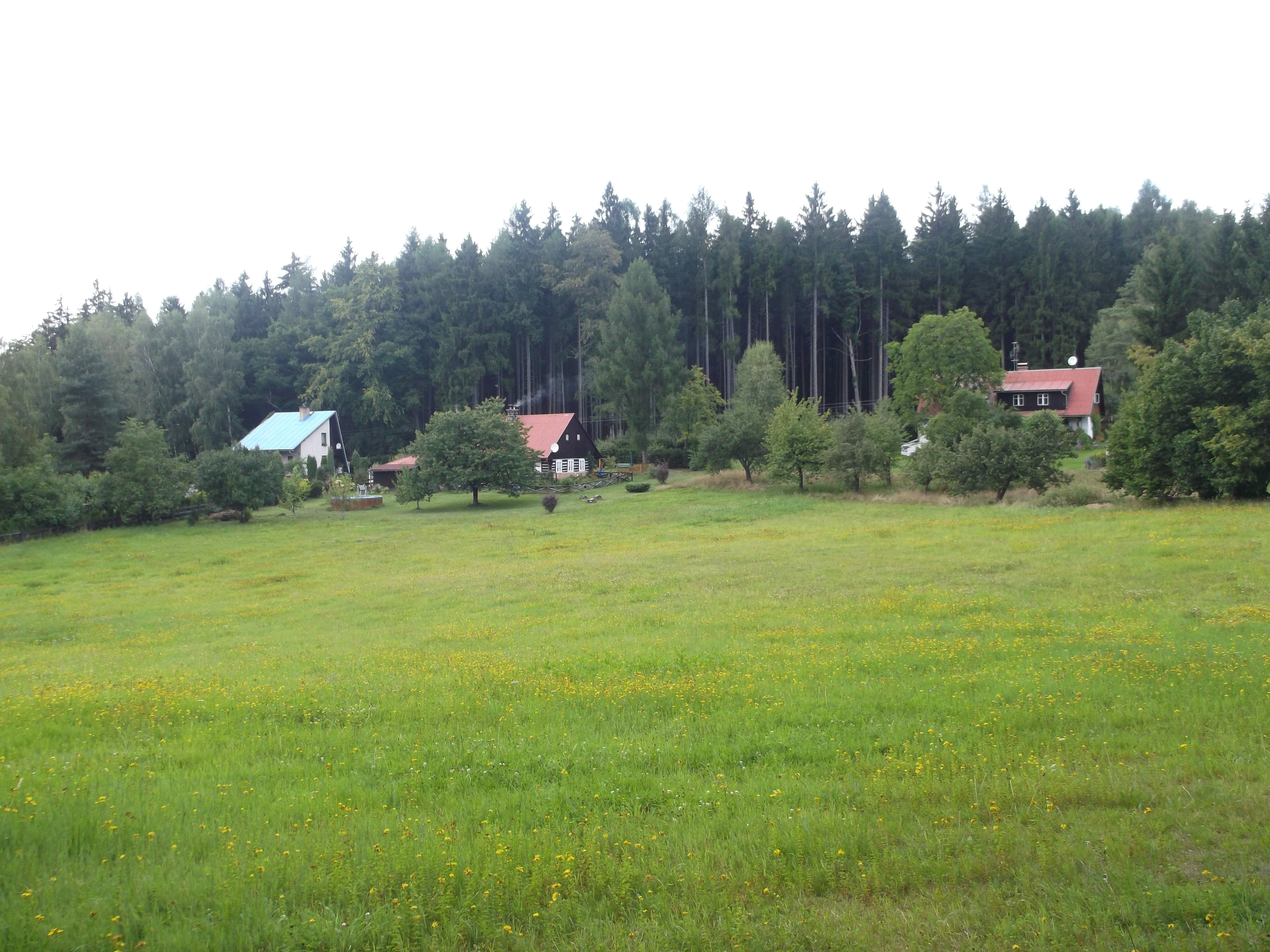 Hájemství - pohled na západní část obce